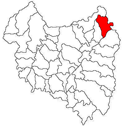 Categorie:Hărţi ale judeţului Covasna